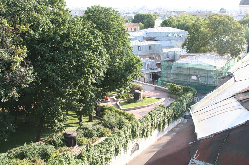 Морозовский сад — исторический городской сад площадью 0,46 га, находится в Басманный район Центрального административного округа Москвы. До революции сад принадлежал семье Морозовых — отсюда и название. Ранее назывался Кокоревским садом по фамилии его прежнего владельца В. А. Кокорева. Сад находится в историческом районе Ивановская горка в черте Белого города. Морозовский сад отделён с трёх сторон от Хохловского, Подкопаевского и Большого Трёхсвятительского переулков подпорной стеной. До реконструкции 2001 года сад имел два лестничных входа с углов. Ныне - один арочный вход с Подкопаевского переулка за железной решёткой. В настоящее время свободный доступ в городской сад закрыт. Благодаря неповторимому рельефу Ивановской горки с площадки Морозовского сада открывался неповторимый вид на Московский Кремль и Ивановский монастырь.